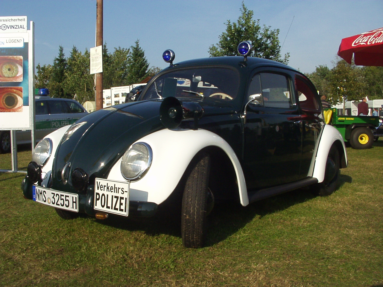 VW Käfer der Verkehrspolizei, 1950er Jahre